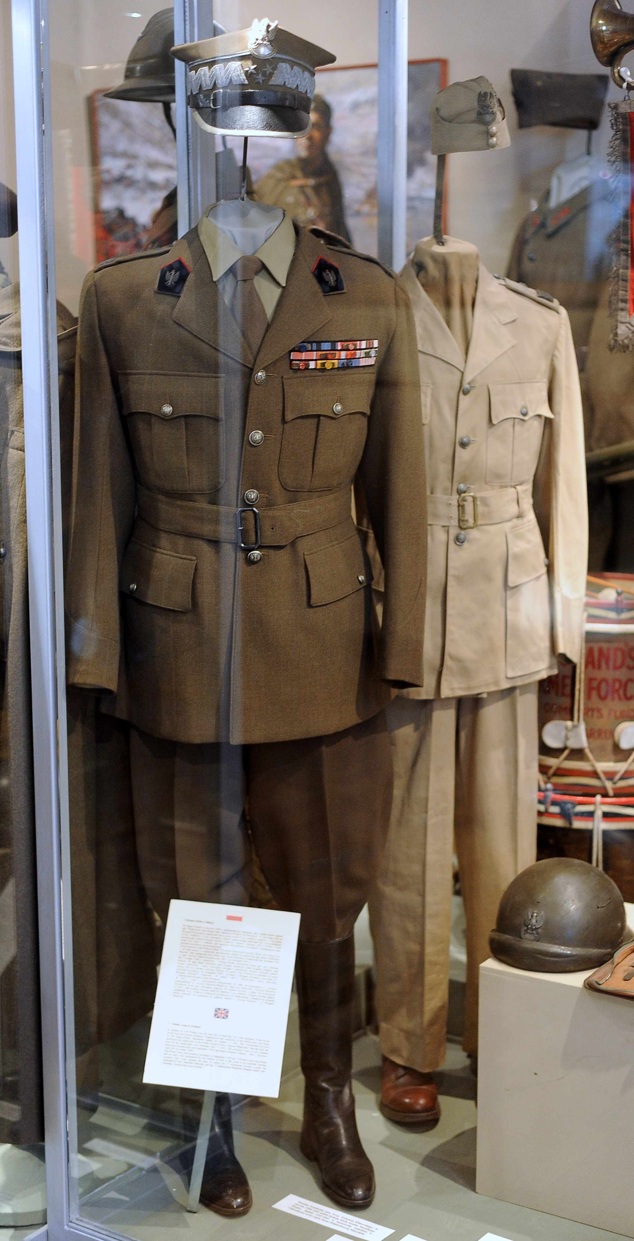 Mundur Naczelnego Wodza gen broni Władysława Sikorskiego, w tle mundur tropikalny gen bryg. Tadeusza Klimeckiego - Szefa Sztabu Naczelnego Wodza. (ze zbiorów Muzeum Wojska Polskiego w Warszawie)